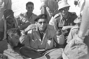 רחבעם זאבי מבצע קדש, 1956, לפני הכניסה למעבר המתלה. אריק שרון – נשען מצד שמאל